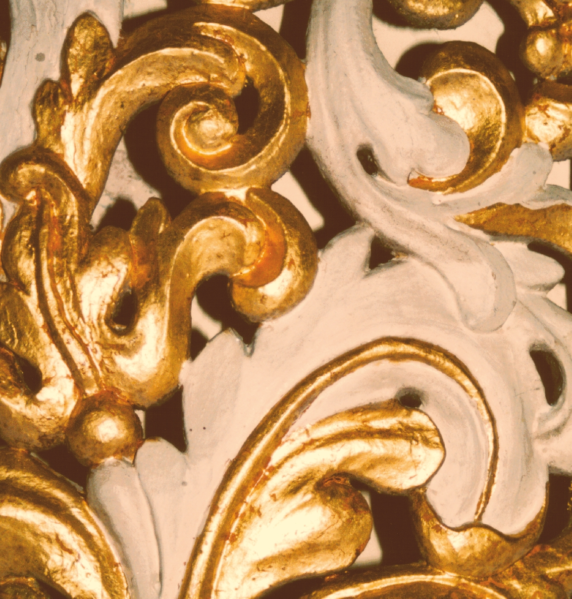 Ornament vom Prospekt der Orgel in der Kilianikirche Höxter